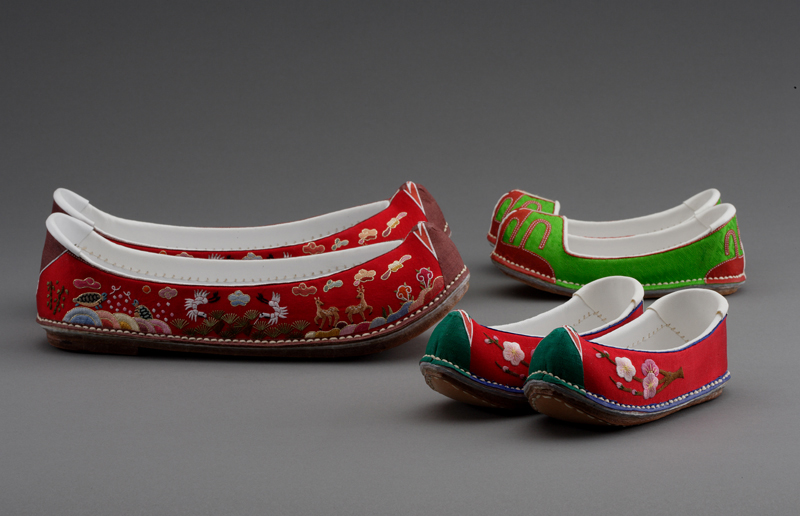 화혜장(靴鞋匠)이란 전통 신을 만드는 장인으로, 조선시대 신목이 있는 신발인 화(靴)를 제작하는 ‘화장(靴匠)’과 신목이 없는 신발인 혜(鞋)를 제작하는 ‘혜장(鞋匠)’을 통칭한 것이다. 조선시대『경국대전』의하면 중앙관청에 소속된 화장은 16명, 혜장은 14명이었다고 한다. 이 기록을 통해 볼때 당시 신에 대한 수요가 많았으며, 그 기능도 분화되어 있었음을 알 수 있다.